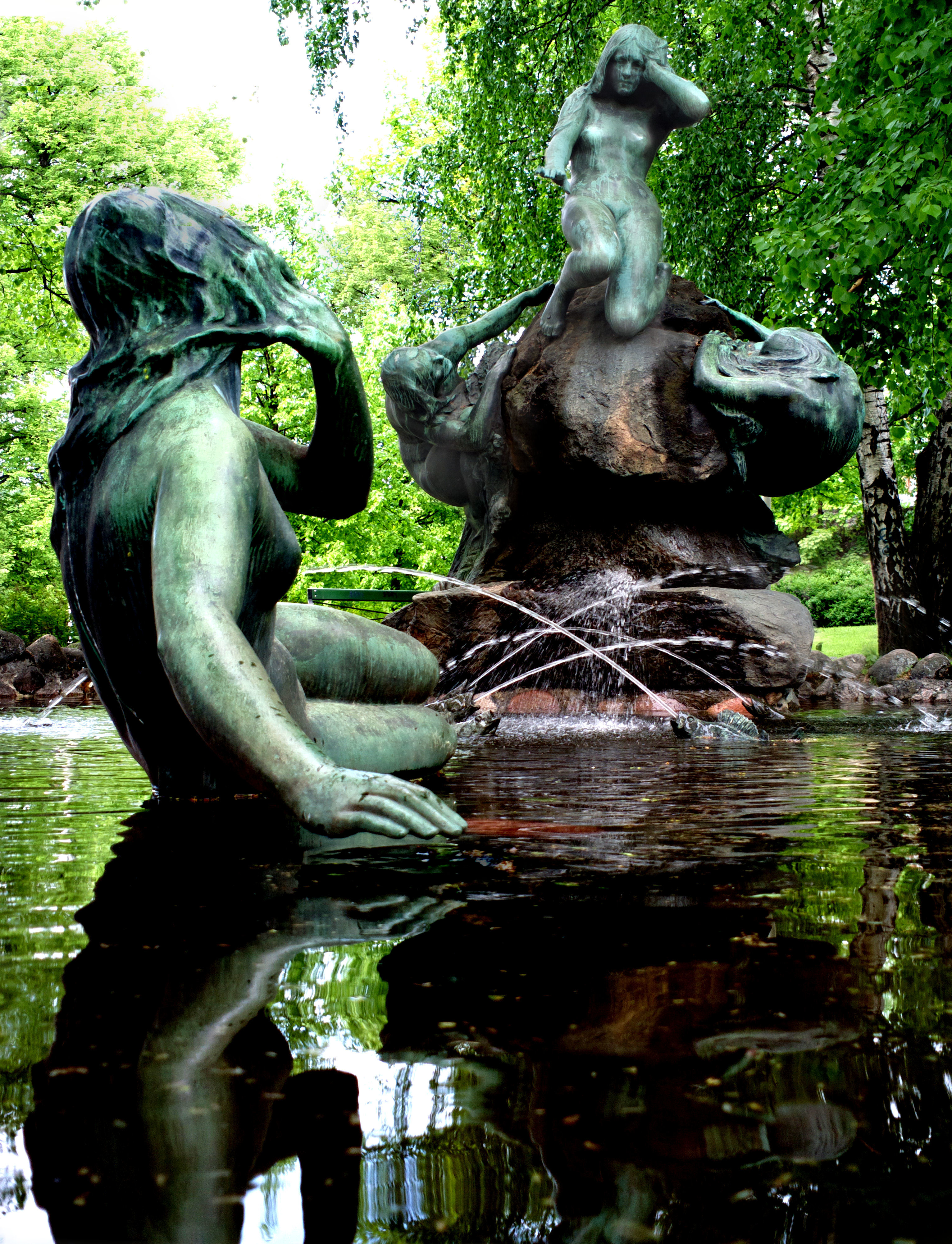 Aino-suihkukaivo (1912) - Emil Wikström. Sijainti: Fellmanin kartanon puisto